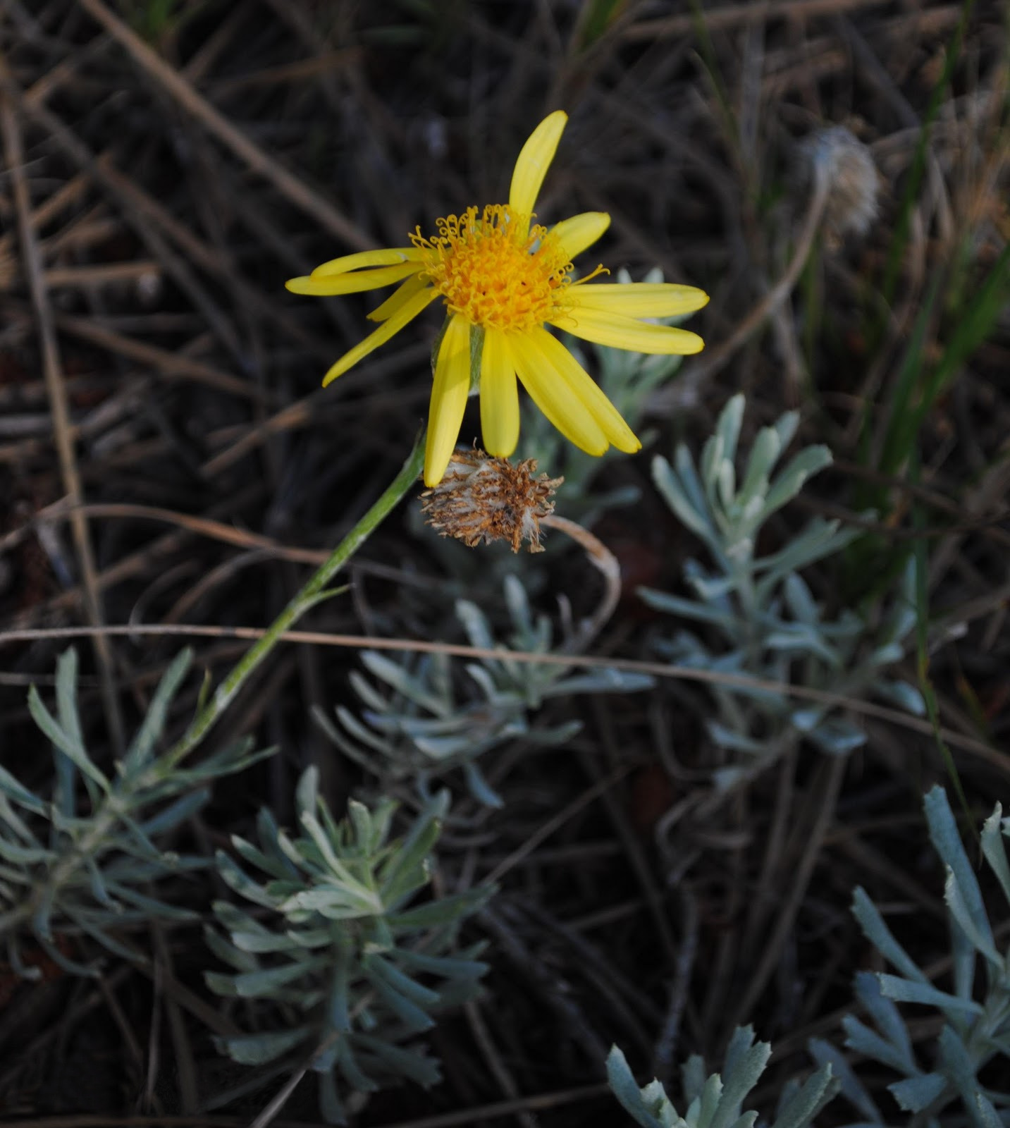 Senecio ceratophylloides. Asteraceae. Fotos tomadas sobre suelo arenoso al margen del Arroyo Pando en El Pinar, departamento de Canelones, Uruguay.